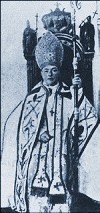 Gerardus Gul (1847-1920), altkatholischer Erzbischof von Utrecht 1892-1920, aufgenommen ca. 1910